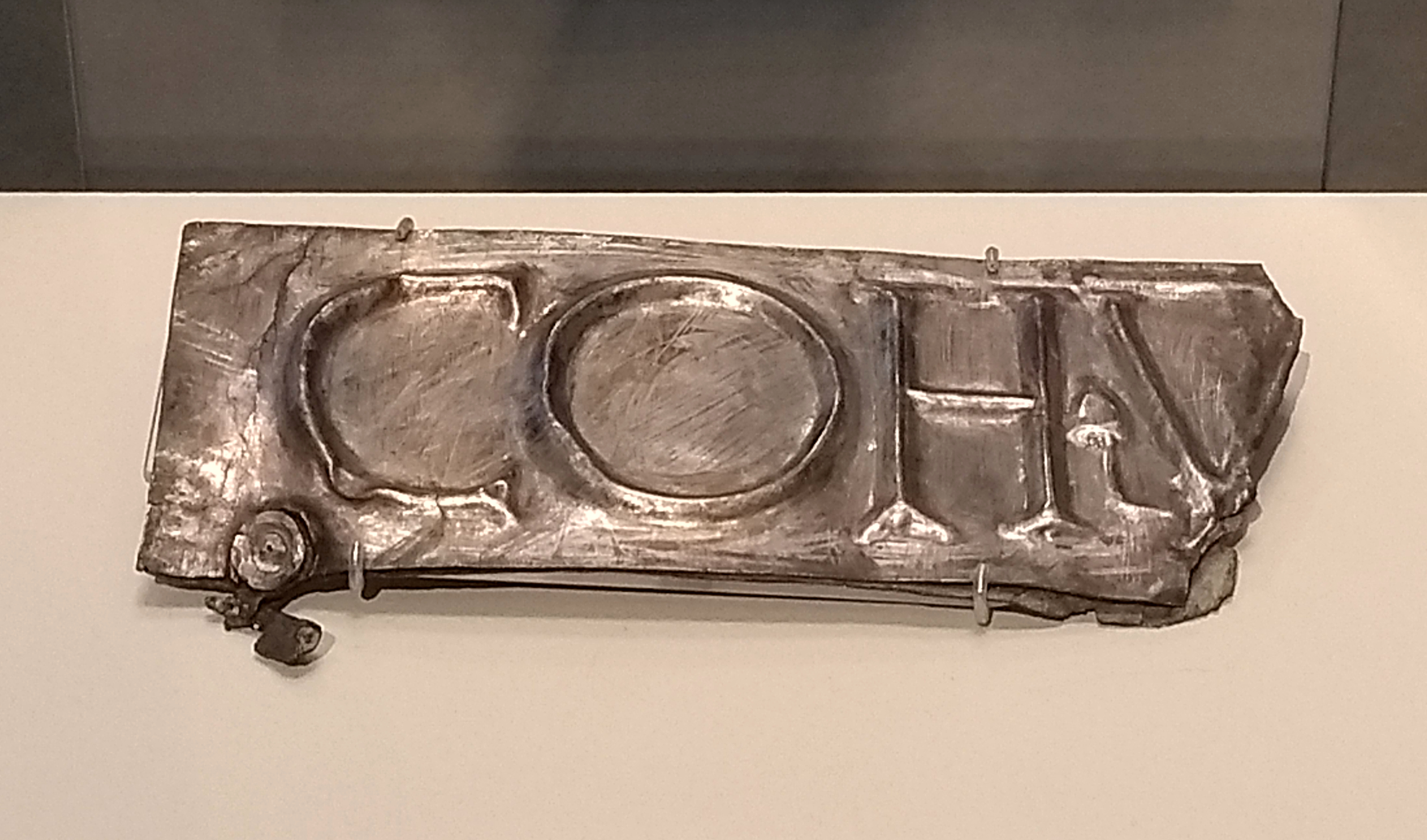 Bruchstück eines römischen Feldzeichens der Cohors VII Raetorum equitata, von dem sich insgesamt drei Stücke erhalten haben. Die beiden anderen Stücke sind die Darstellung eines Kaisers (vielleicht Tiberius) als siegreicher Feldherr und die Lanzenspitze des Feldzeichens. Fundort Niederbieber, heute im Rheinischen Landesmuseum Bonn